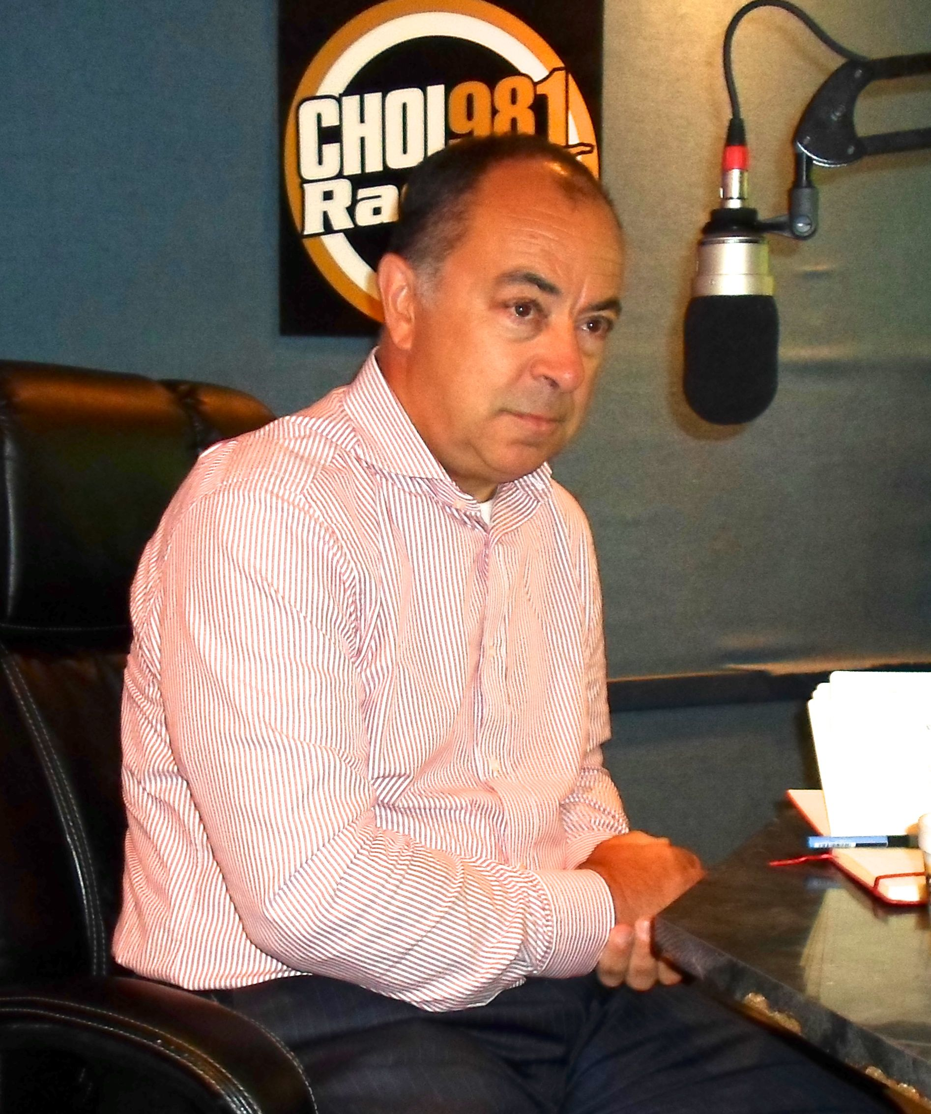 Christian Dubé en 2012 lors d'une entrevue à CHOI Radio-X